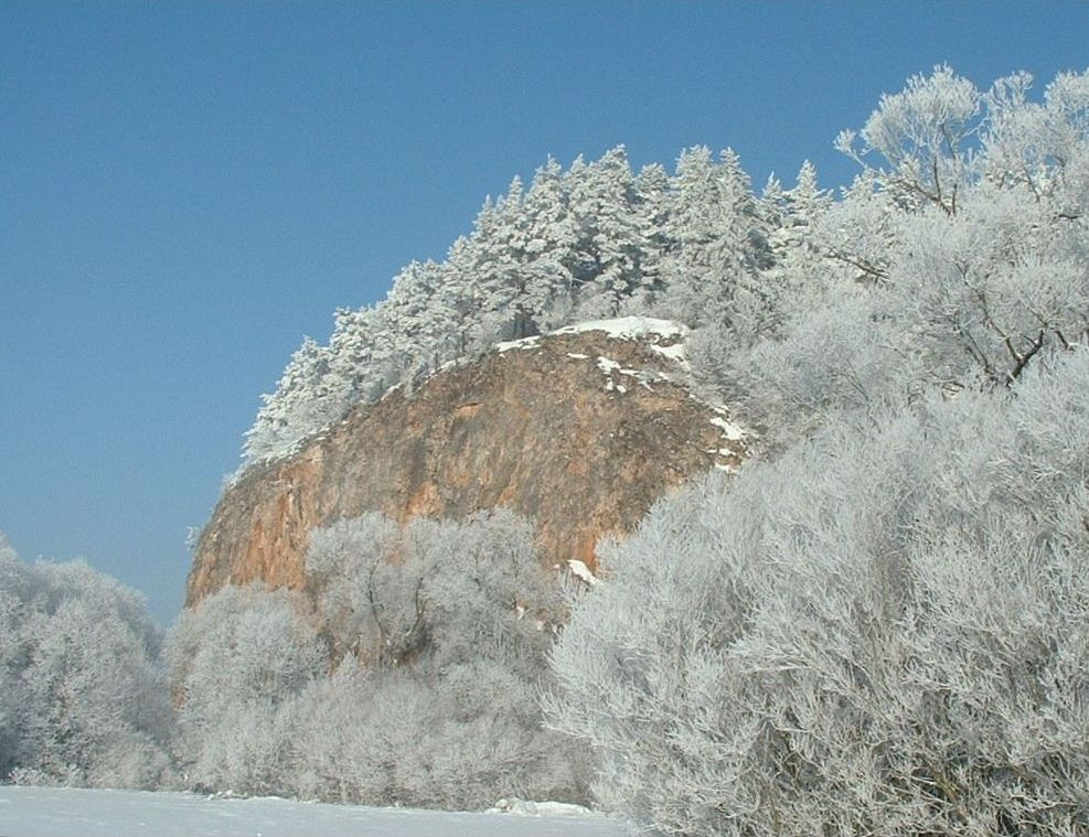 Kramnica w rezerwacie przyrody "Przełom Białki". Zdjęcie zrobione na początku roku 2006.